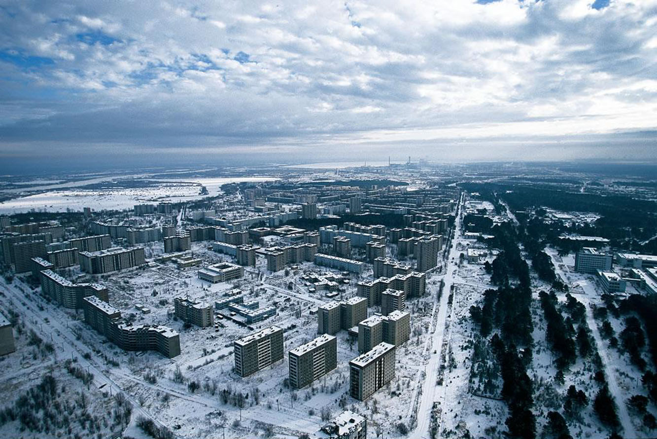 Una imagen, para dar una idea sobre el interior de la ciudad misteriosa.